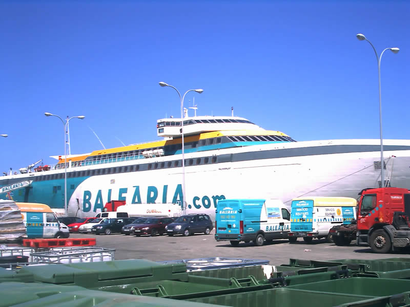 Foto der ersten Schnellfähre der Balearia, die „HSC Federico Garcia Lorca“, im Hafen von Dénia.